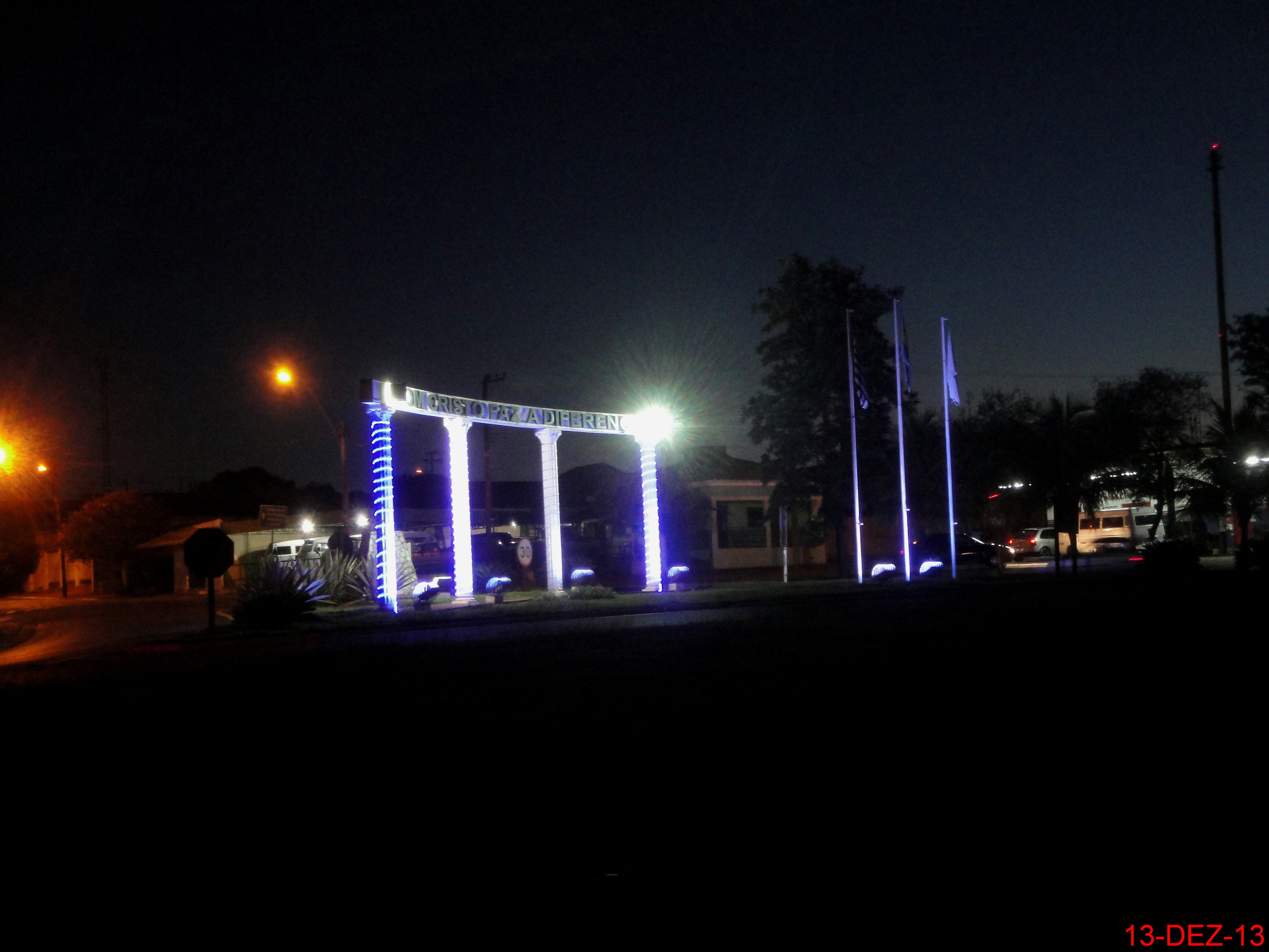 Entrada da cidade de Palmares Paulista vista da Rodovia Comendador Pedro Monteleone - SP-351 Km-194